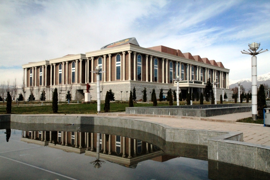 Национальный музей Таджикистана - новое здание музея, 2013 год, Душанбе